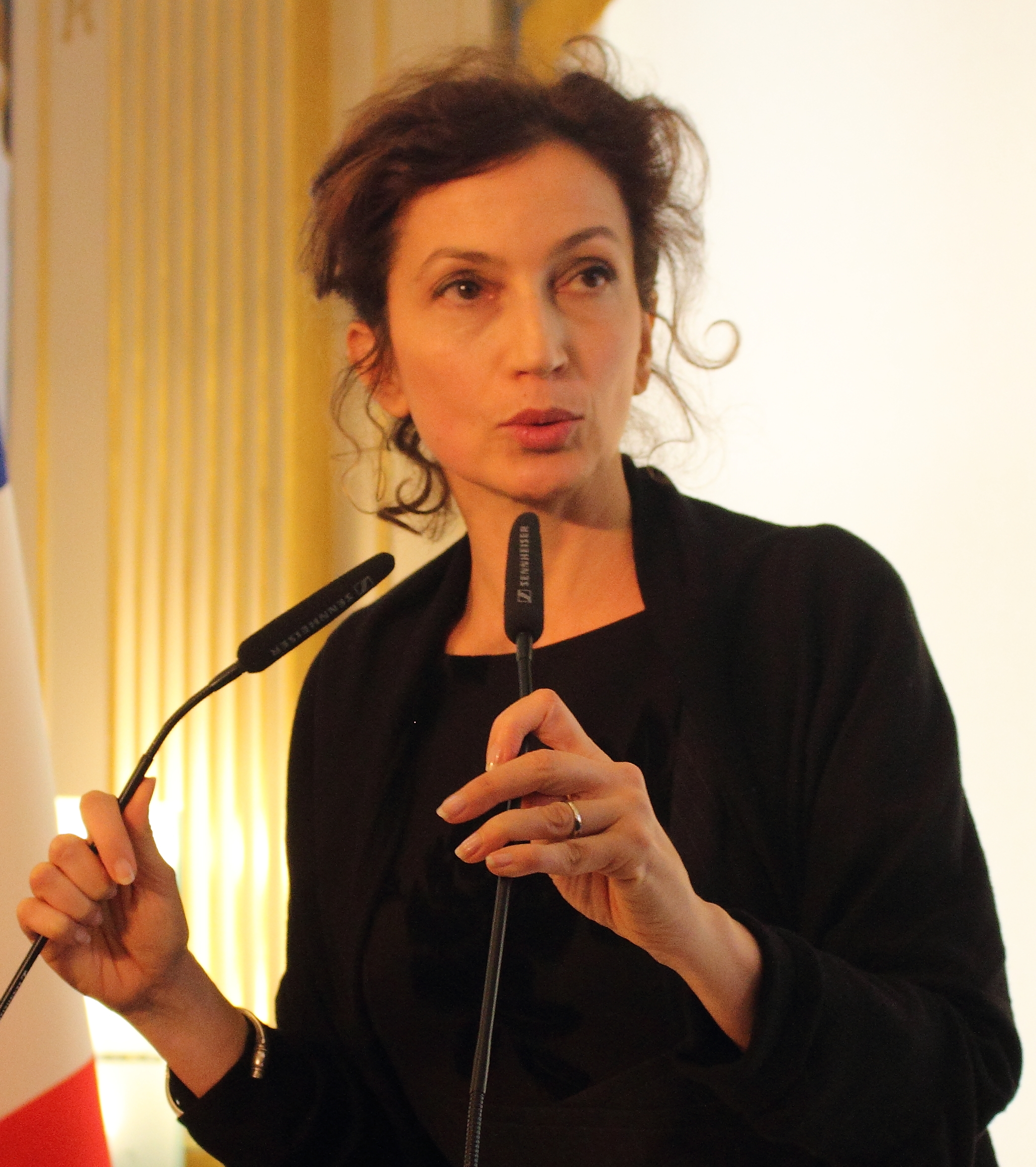 Audrey Azoulay , le 12 février 2016